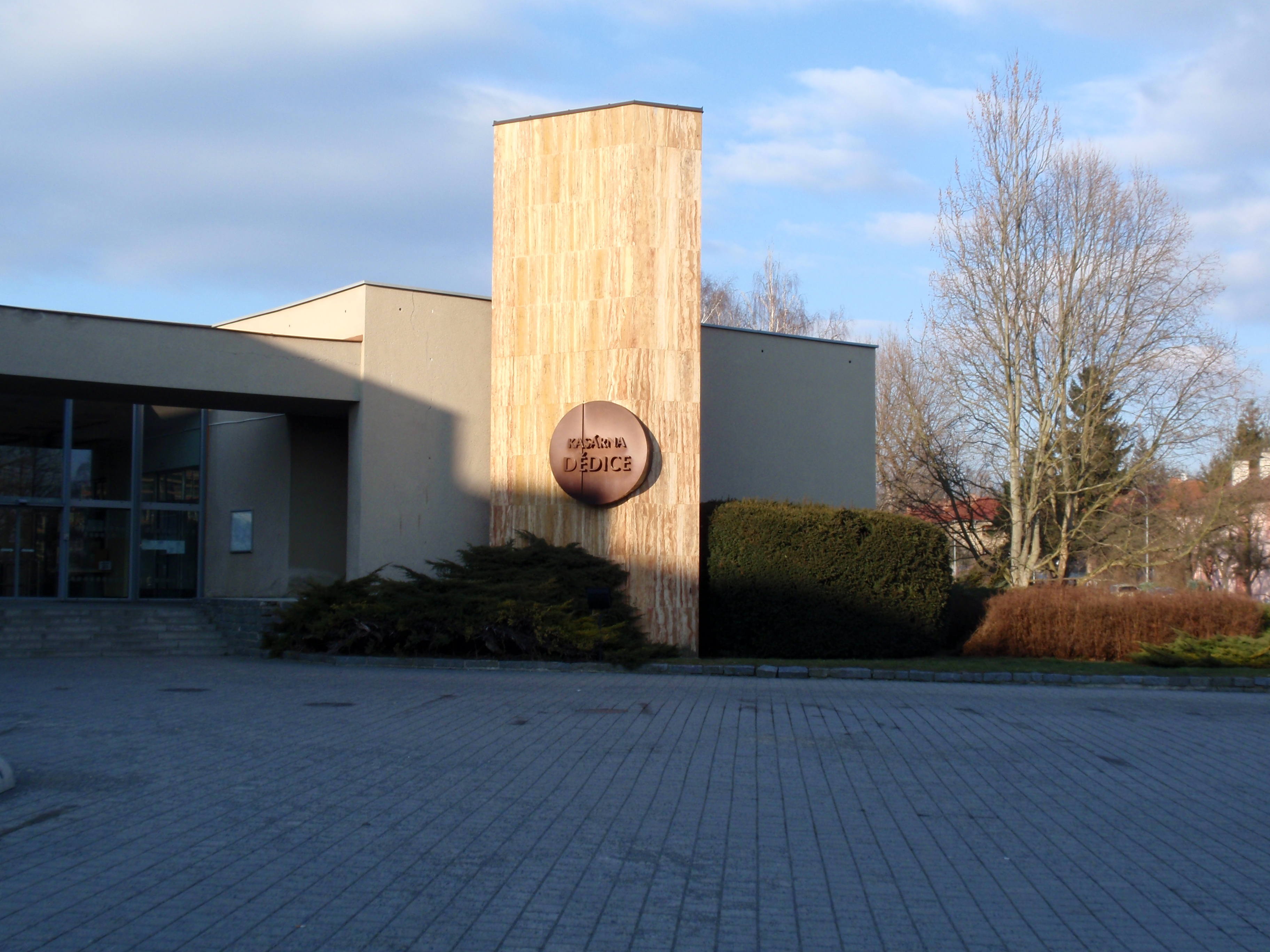 Dědice, Kasárna Dědice, areál vojenských škol